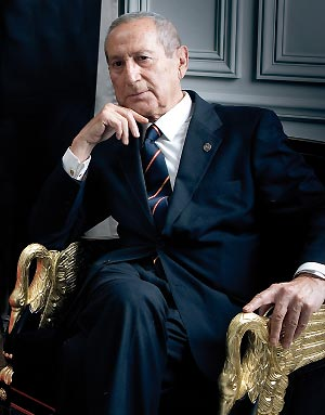 Elio Berhanyer nació el 20 de febrero de 1929 en Córdoba, España. Es un diseñador y modisto